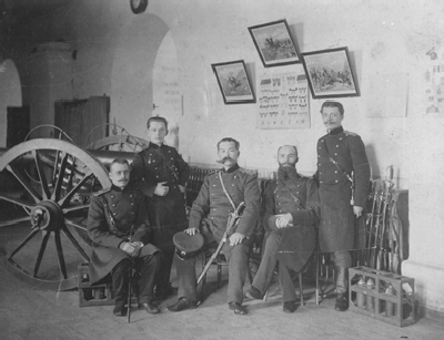 H. Konopacki drugi od lewej - Szkoła Artyleryjska w Peterburgu